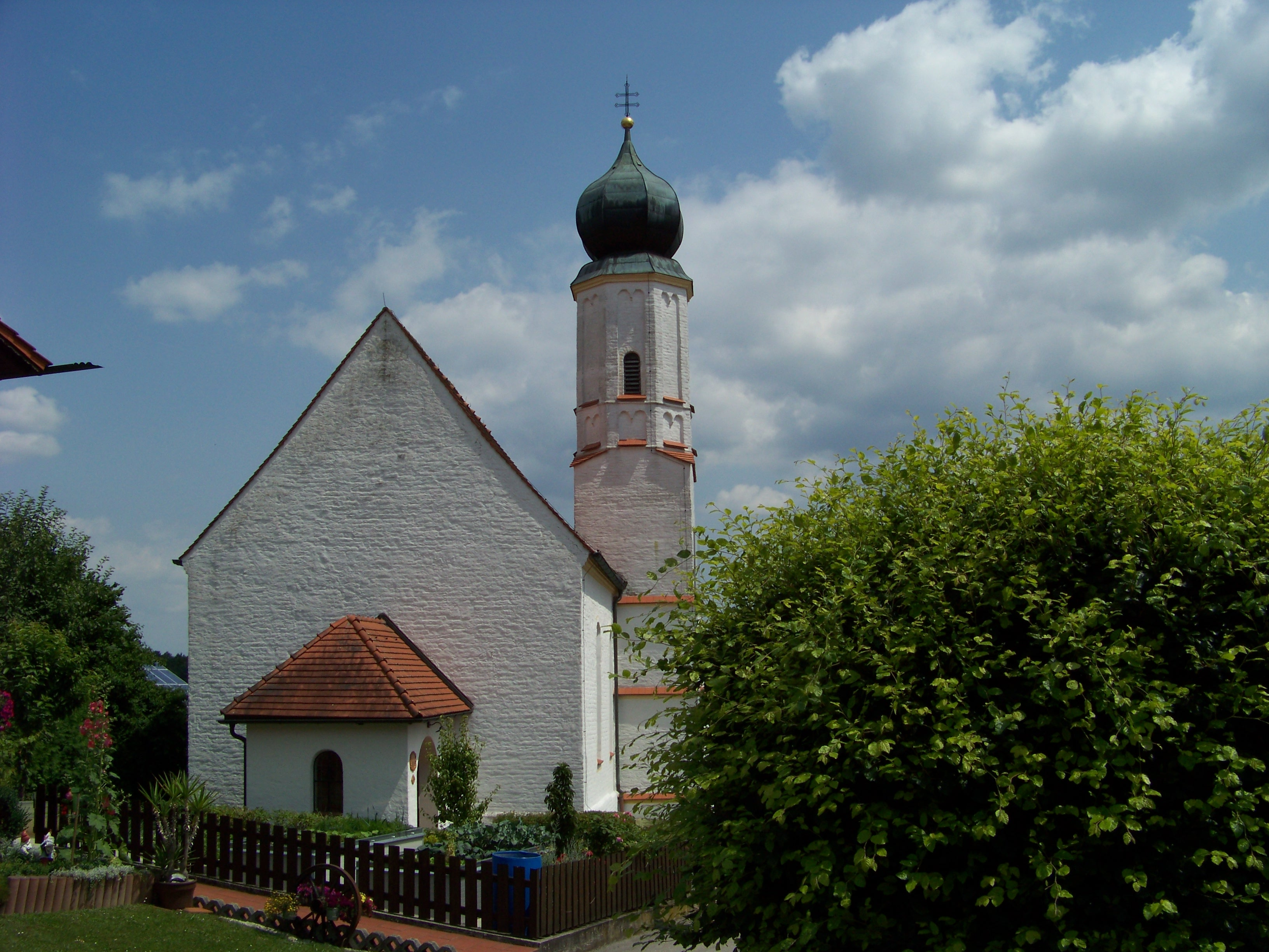 Marklkofen, Poxau, Kalvarienbergstraße 12. Katholische Filialkirche St. Georg und Martin. Saalbau mit Südturm und eingezogenem Chor, im Kern gotisch, im 18. Jahrhundert und 1904/5 verändert; mit Ausstattung.